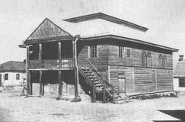 Дерев'яна синагога в Торговиці.